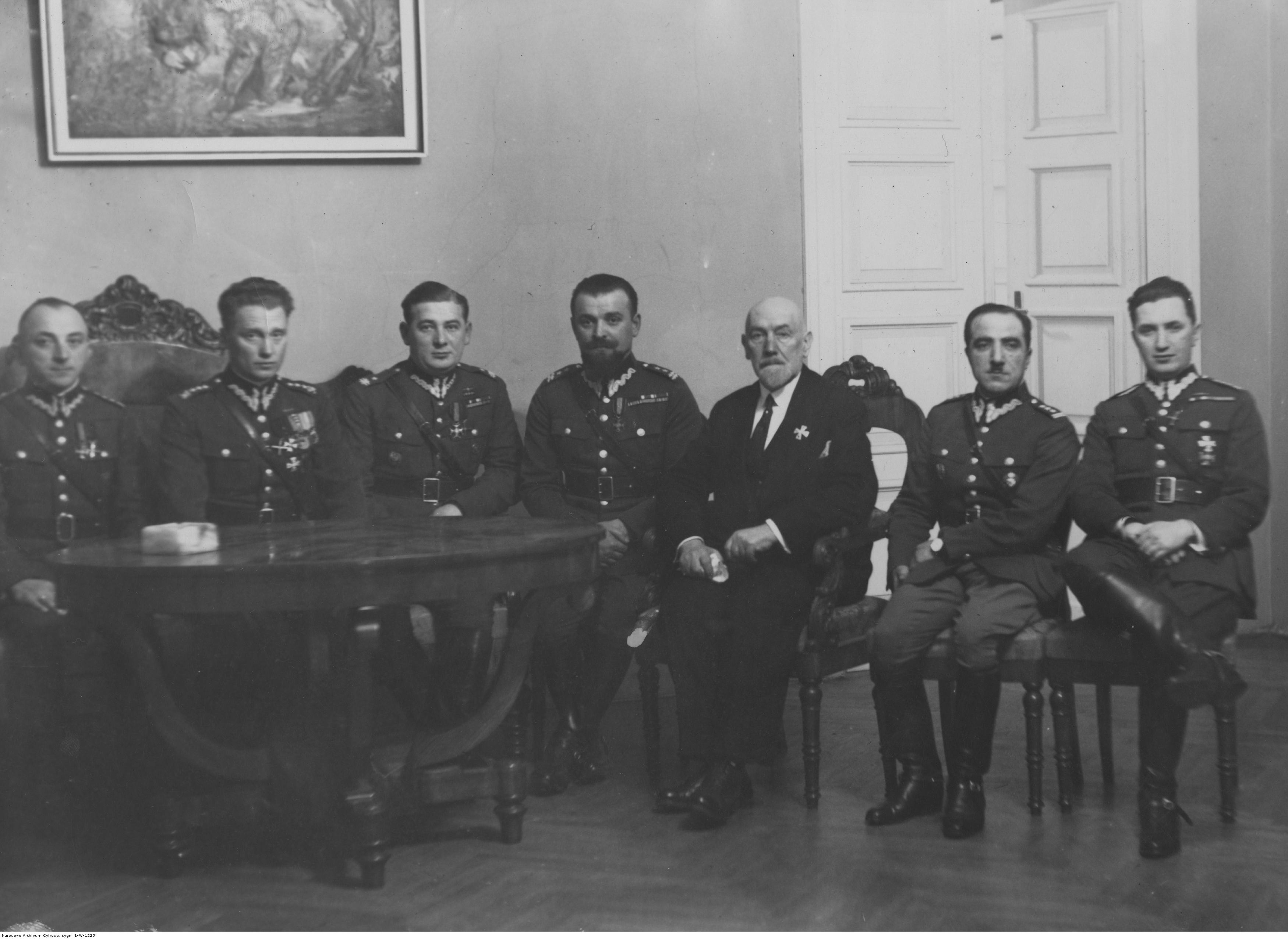 Zygmunt Cšadek (siedzi w środku). Słuchacze odczytu na temat "Dusza wielkiej wojny w powieści". Od lewej: kpt. Boryczko, kpt. Stefan Pomarański, mjr Zdon, ppłk Zygmunt Csadek, Cezary Jellenta, płk Irafił-bej, kpt. Jellenta. 21 stycznia 1932